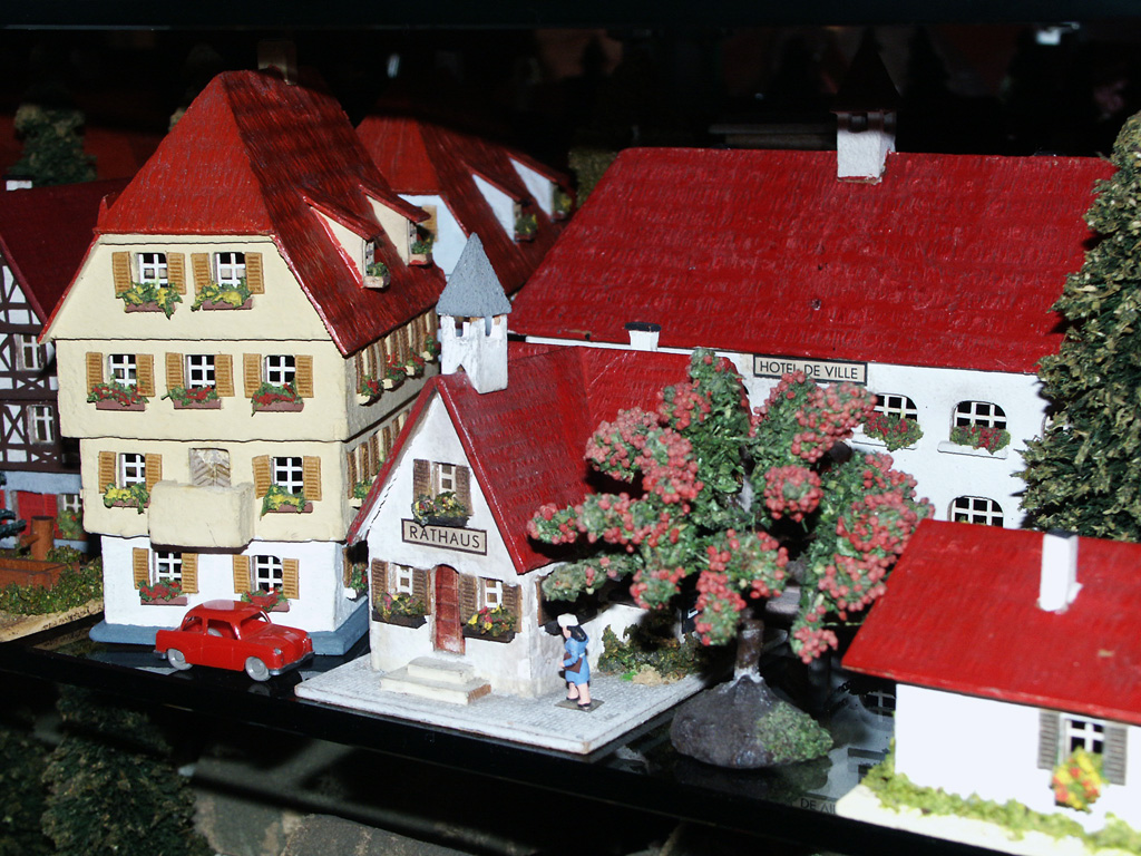 Modellbauten der Marke RS (Dr. Rudolf Spitaler), Bad Kissingen